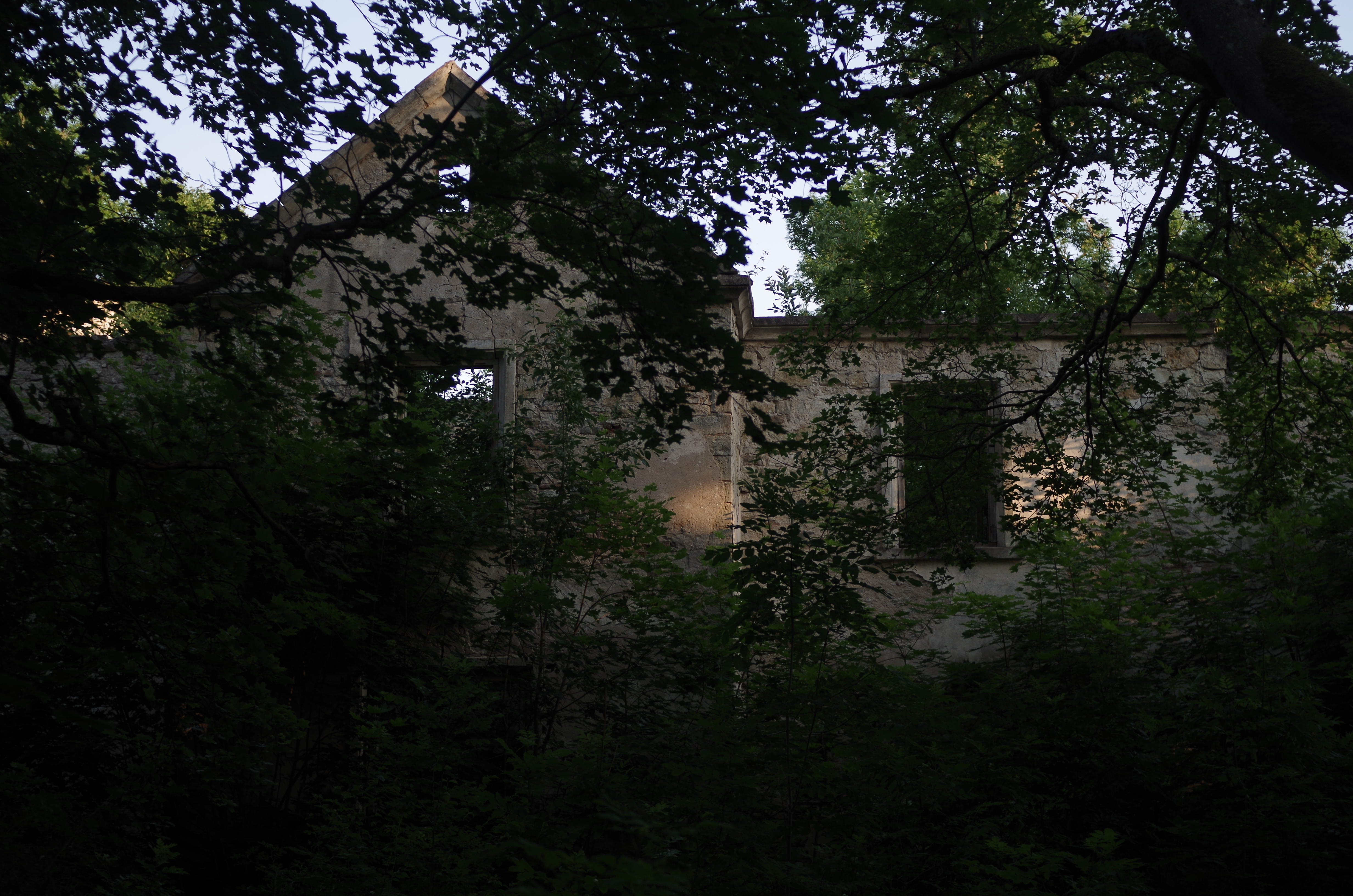 Pilt aastast 2014. Kasti küla, Kaarma vald, Saare maakond.